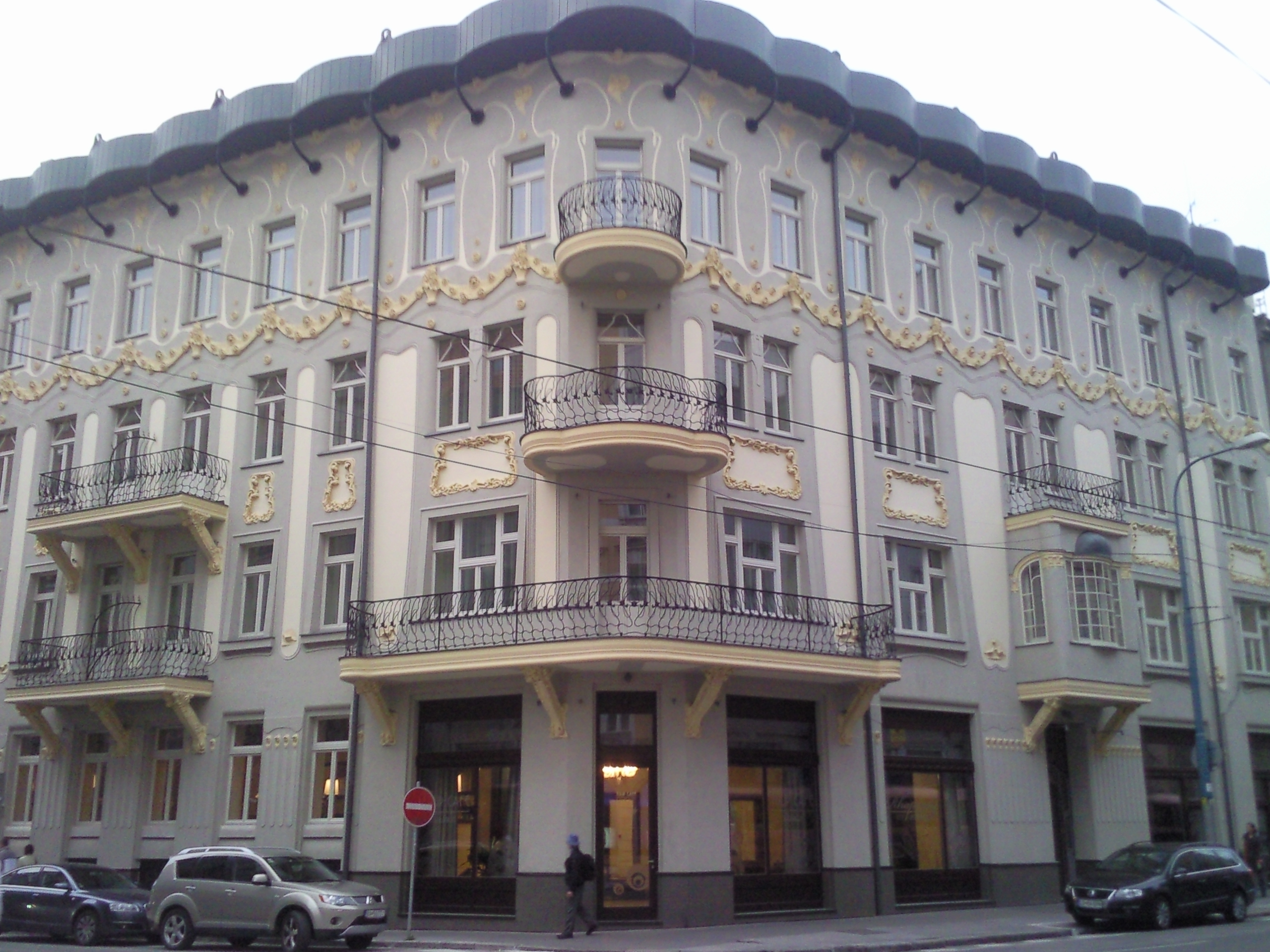 Zrekonštruovaná secesná budova na Štúrovej ulici v Bratislave slúžiaca ako 4-hviezdičkový hotel